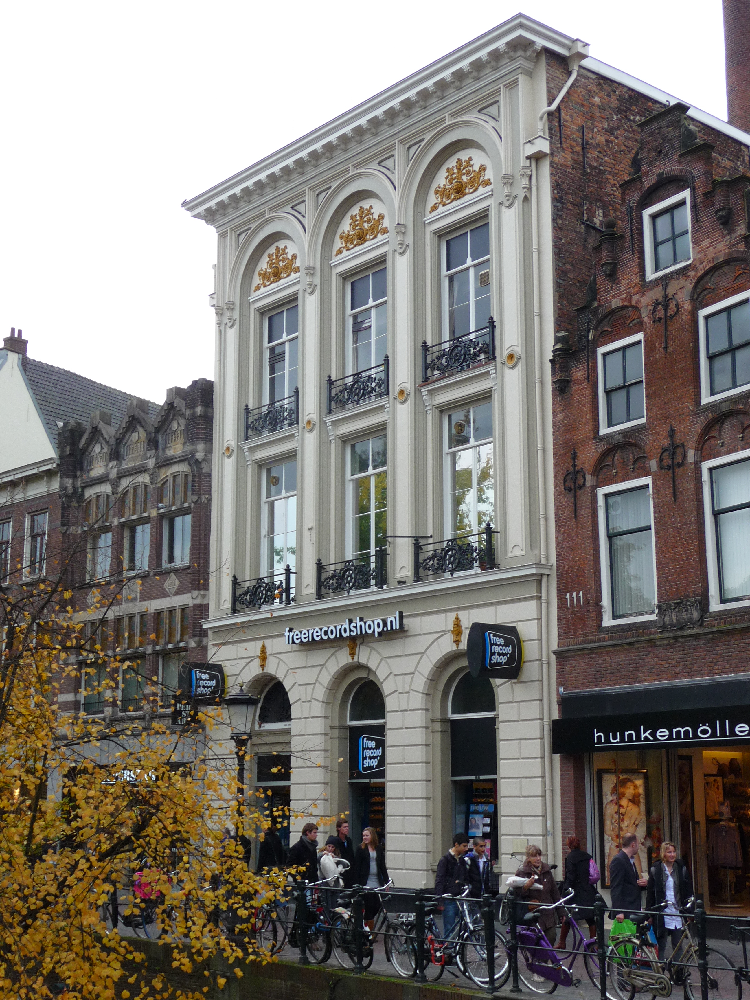 Rijksmonument aan de Oudegracht in Utrecht